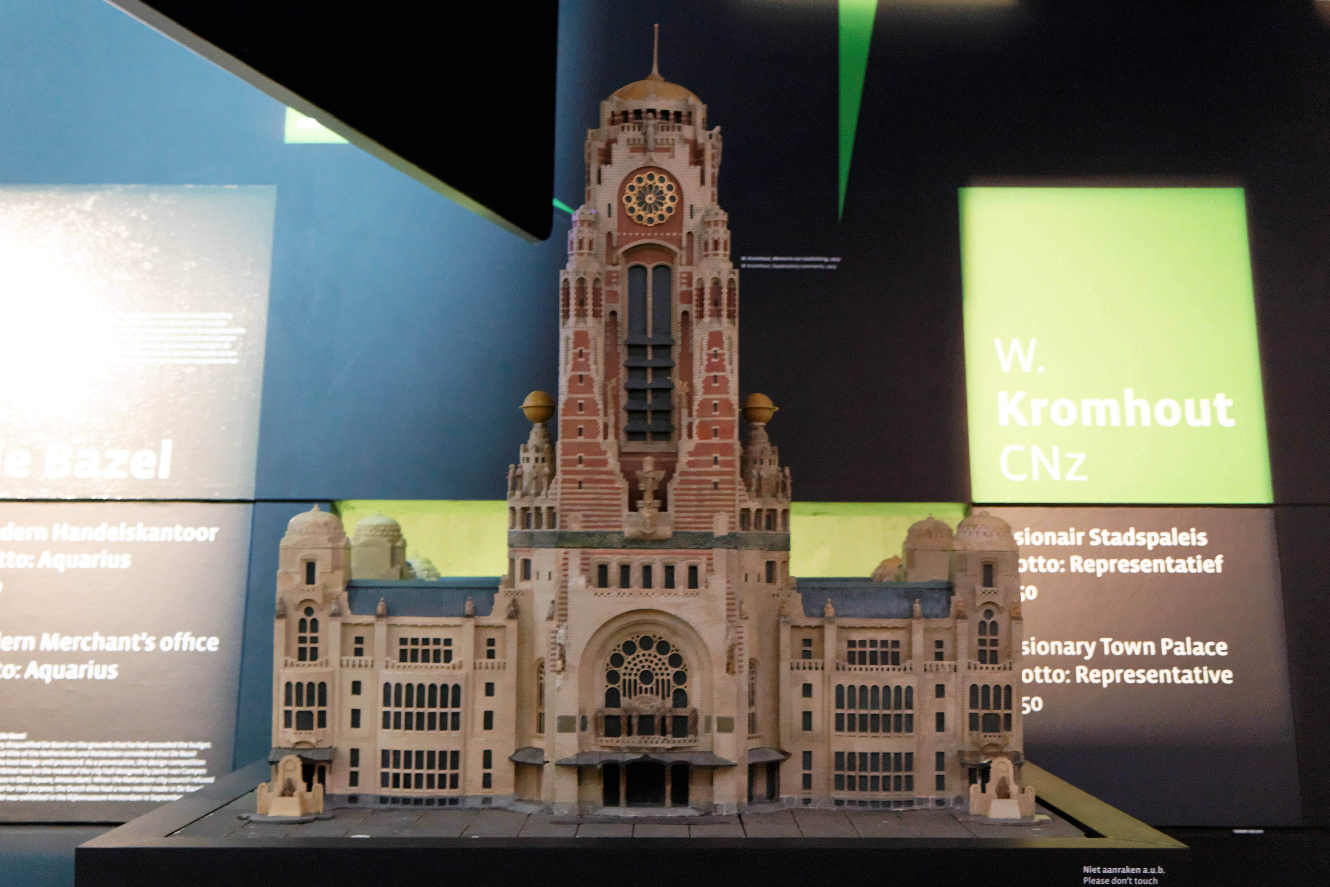 Titel: Prijsvraagmaquette Raadhuis Rotterdam Jaar: 1912 Ontwerper: W. Kromhout Collectie: NAi, bruikleen Gemeentearchief Rotterdam Objectnummer: M965/M273 Tag: 24002 Titel: Prijsvraagmaquette Raadhuis Rotterdam Jaar: 1912 Ontwerper: W. Kromhout Collectie: NAi, bruikleen Gemeentearchief Rotterdam Objectnummer: M965/M273 090621-161808_ 0576_50D_raw